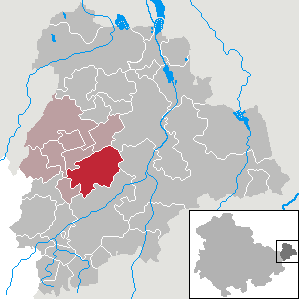 Altkirchen in Thuringia - District Altenburger Land